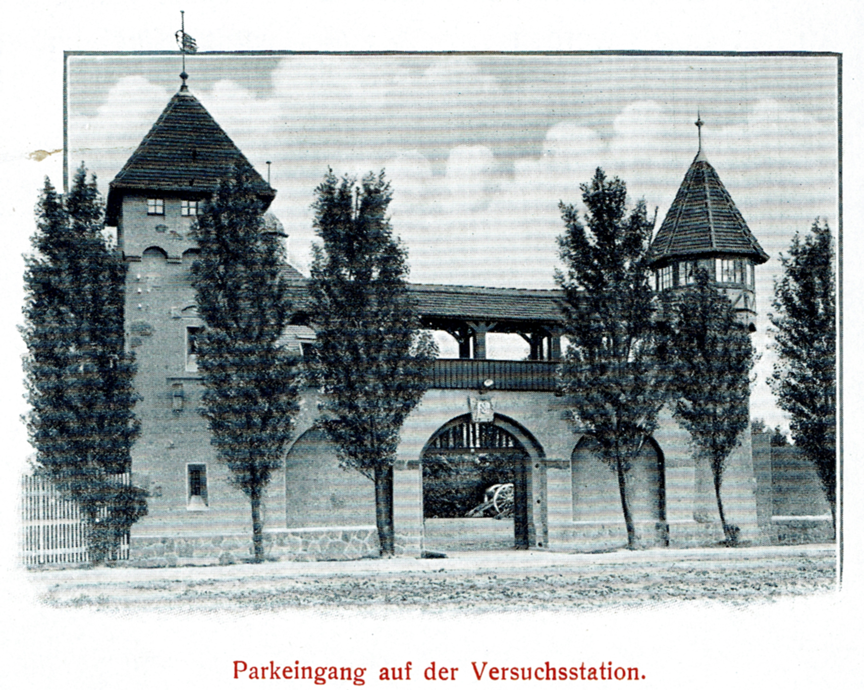 Rud. Sack. Leipzig-Plagwitz. 1863–1913. Lebensgeschichte des Begründers, Entwicklung und Stand des Werkes. Meisenbach Riffarth & Co., Leipzig 1913.